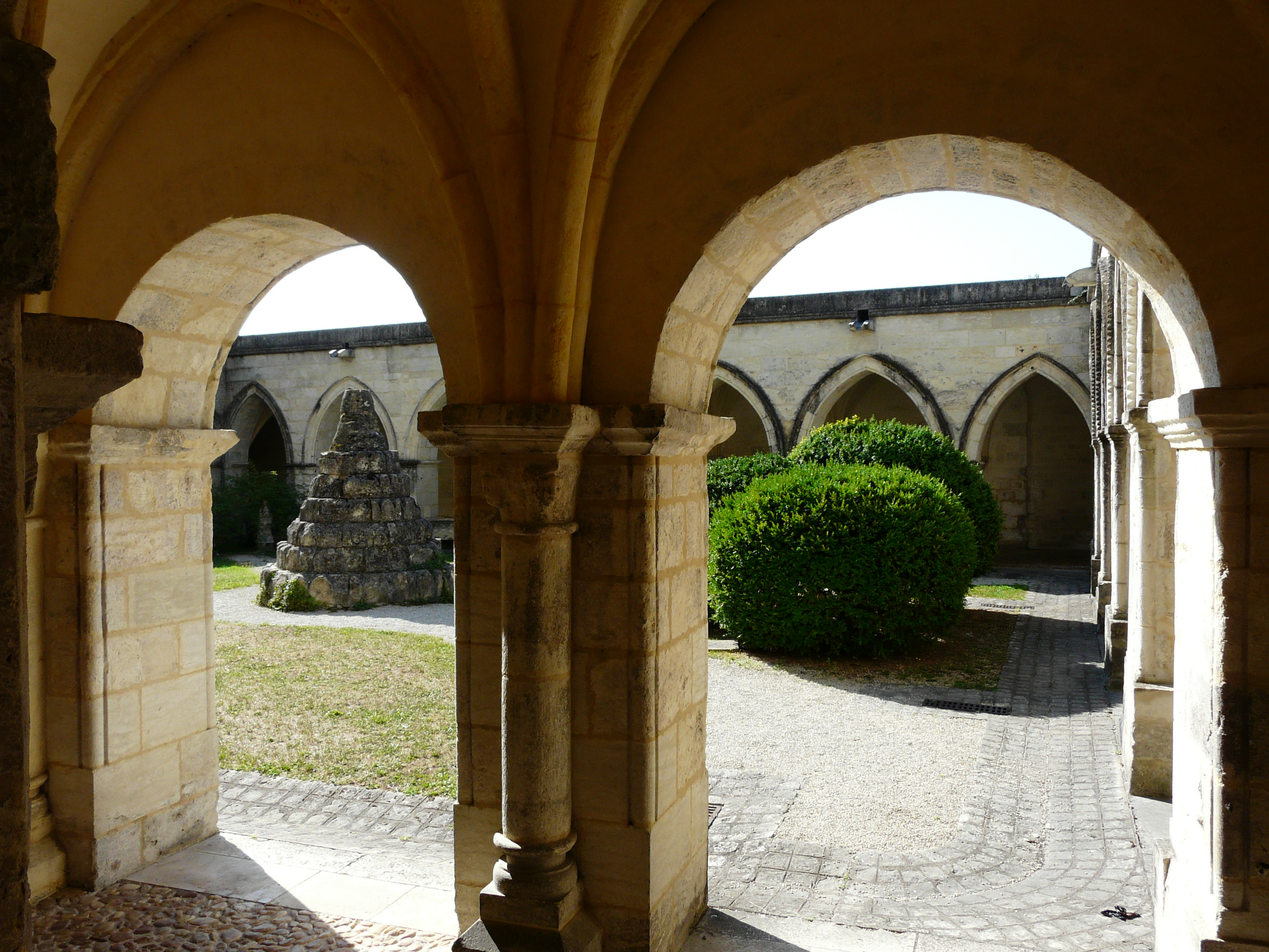 Le cloître de la cathédrale Saint-Front de Périgueux, Dordogne, France. .